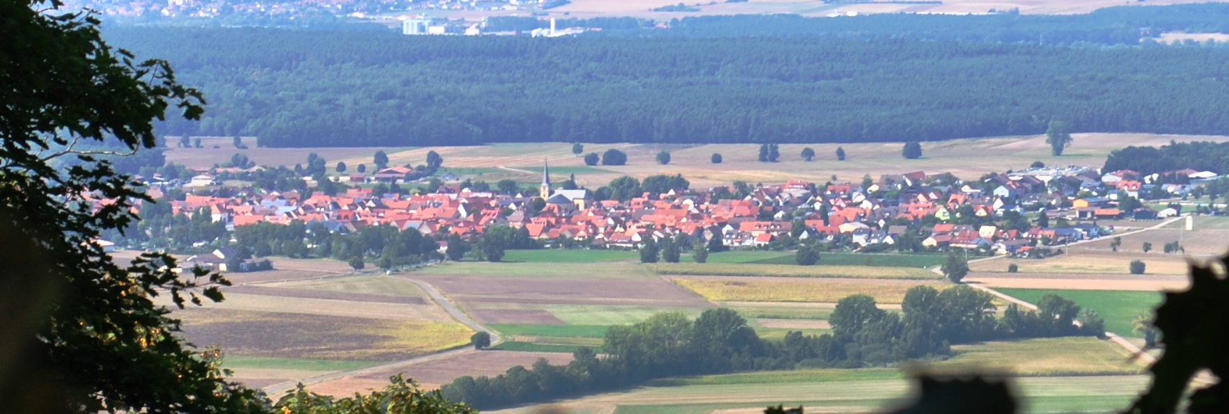 Panorama Großlangheim vom Schwanberg aus